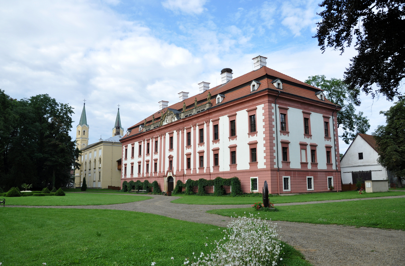 Schloss